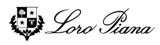 Логотип Loro Piana